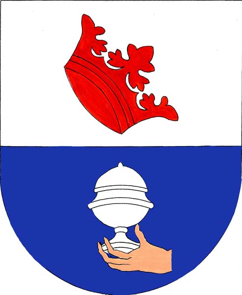 Znak obce Malý Bor